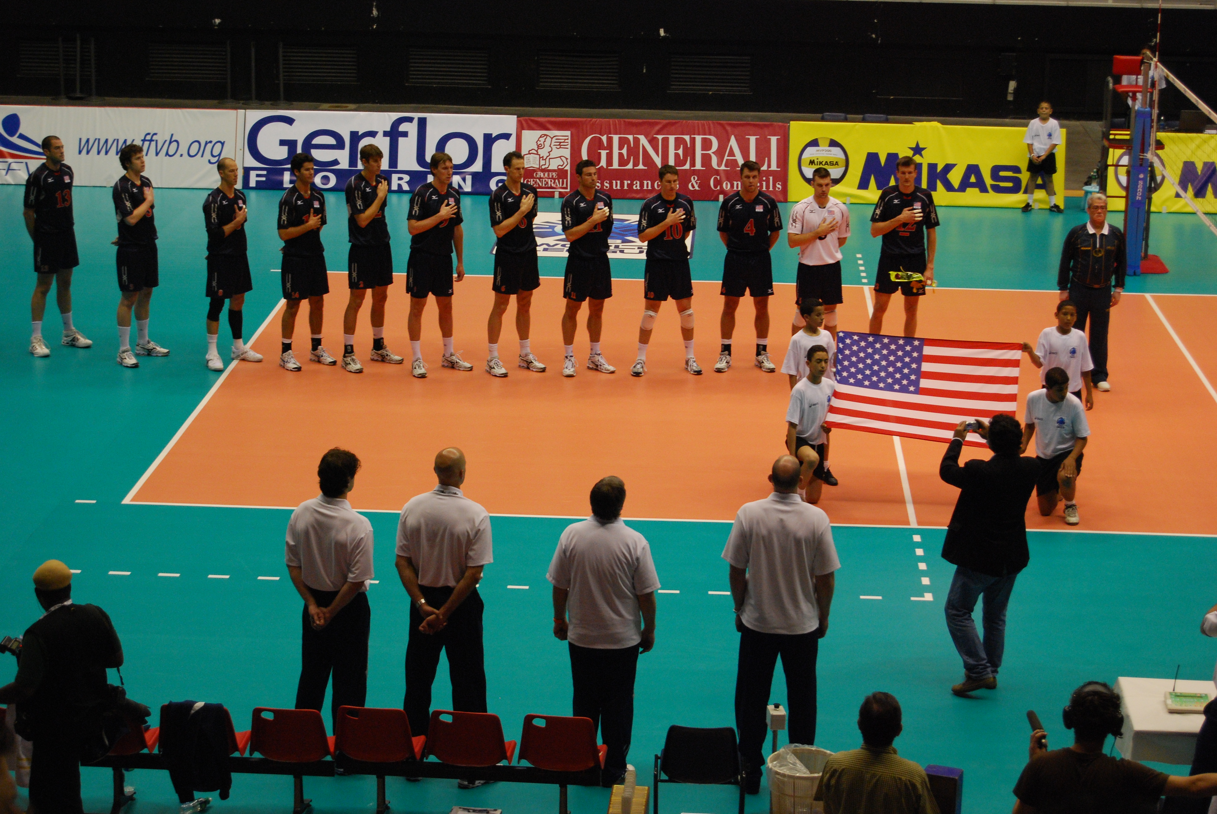 équipe des USA de Volley-ball, Ligue Mondiale 2007 France-USA 8 juin 2007 Lyon